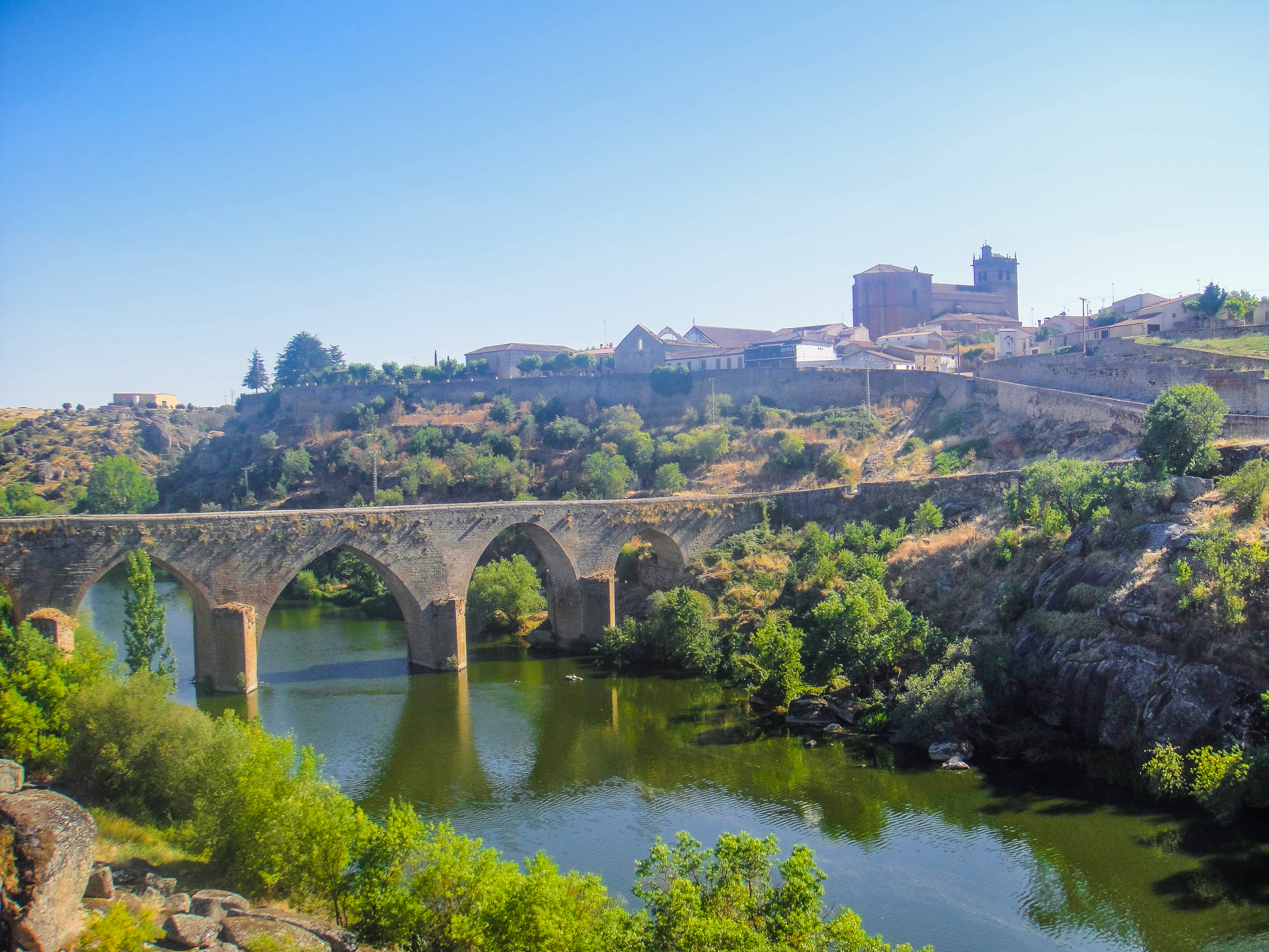 Vista general de la ciudad de Ledesma